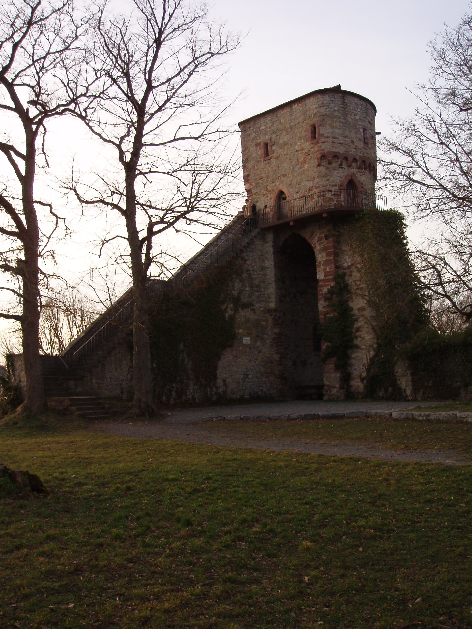 Ruine Hohennagold, Wehrturm und Bergfried